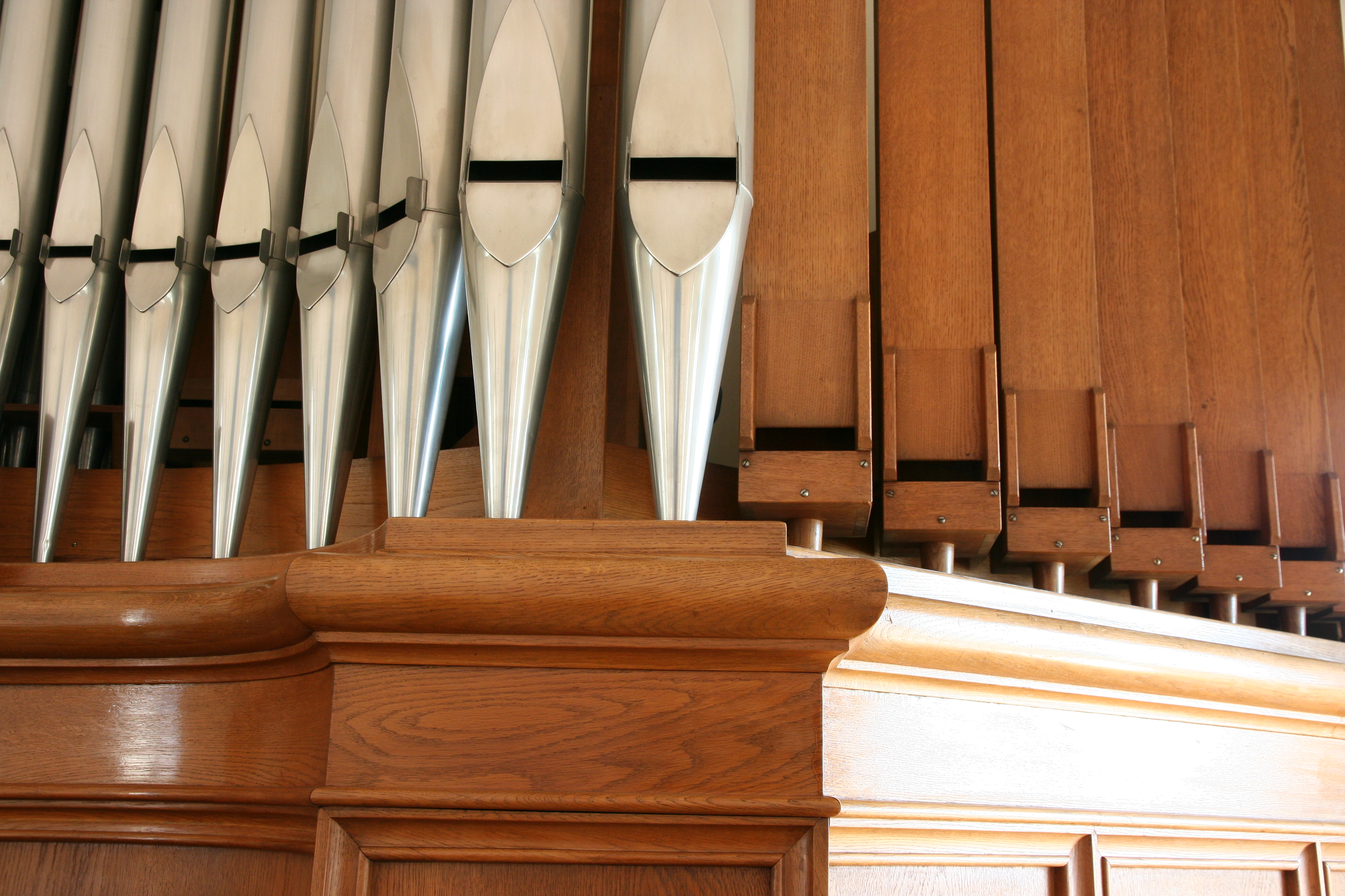 Römisch-katholische Pfarrkirche St. Pirminius Pfungen